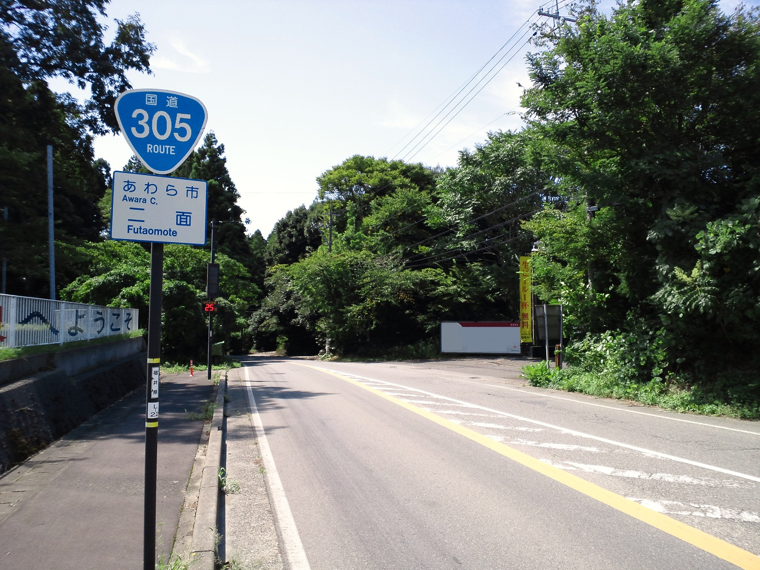 あわら市二面付近の国道305号。